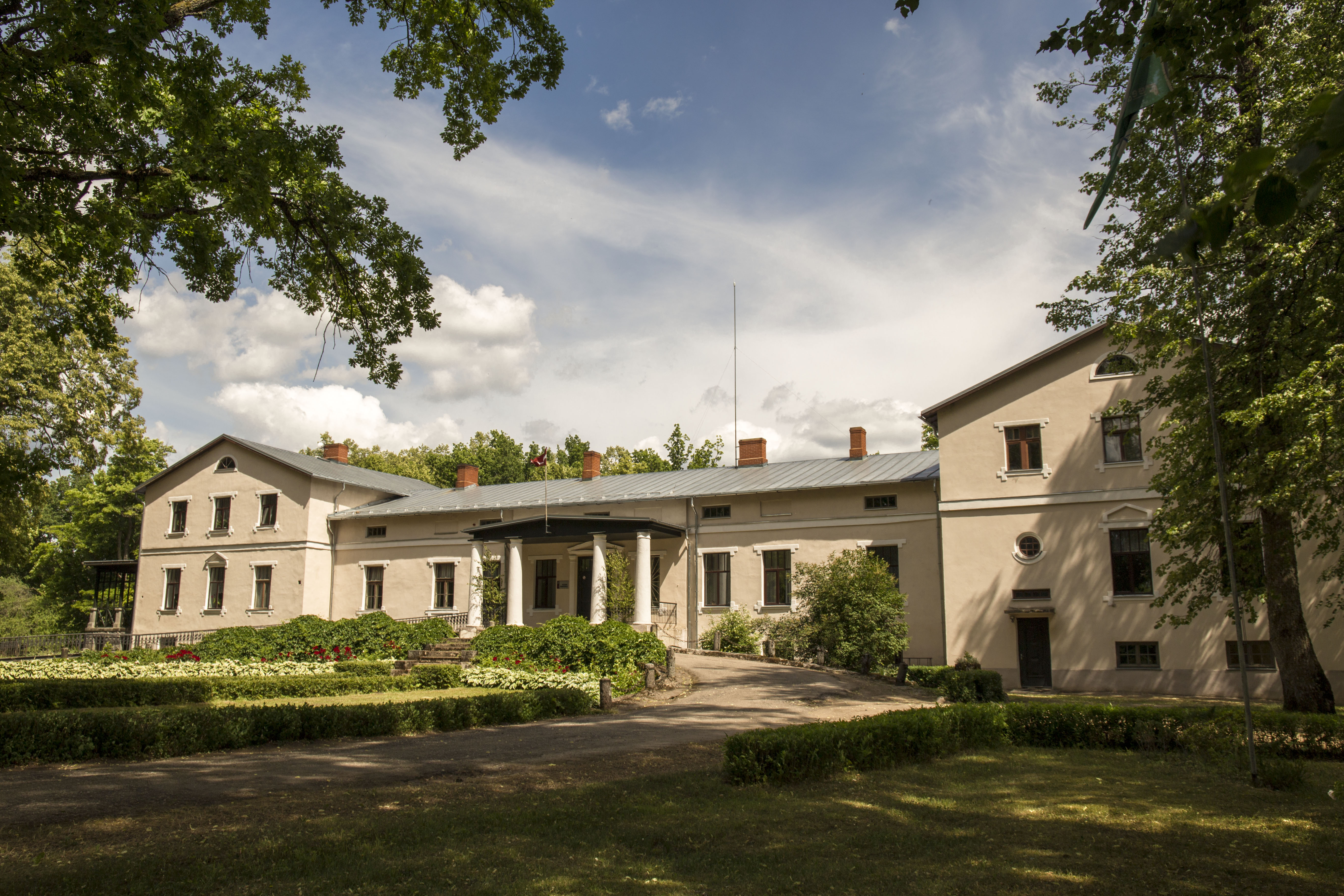 Vestienas muižas apbūve, Vestiena